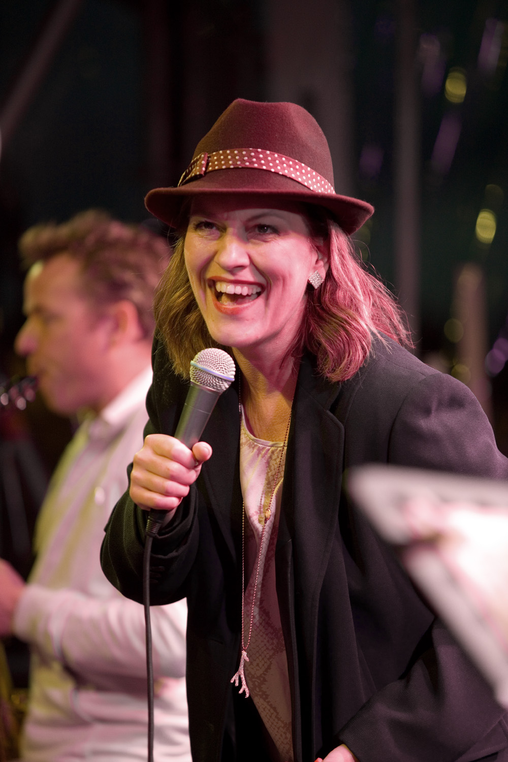 Fay Claassen